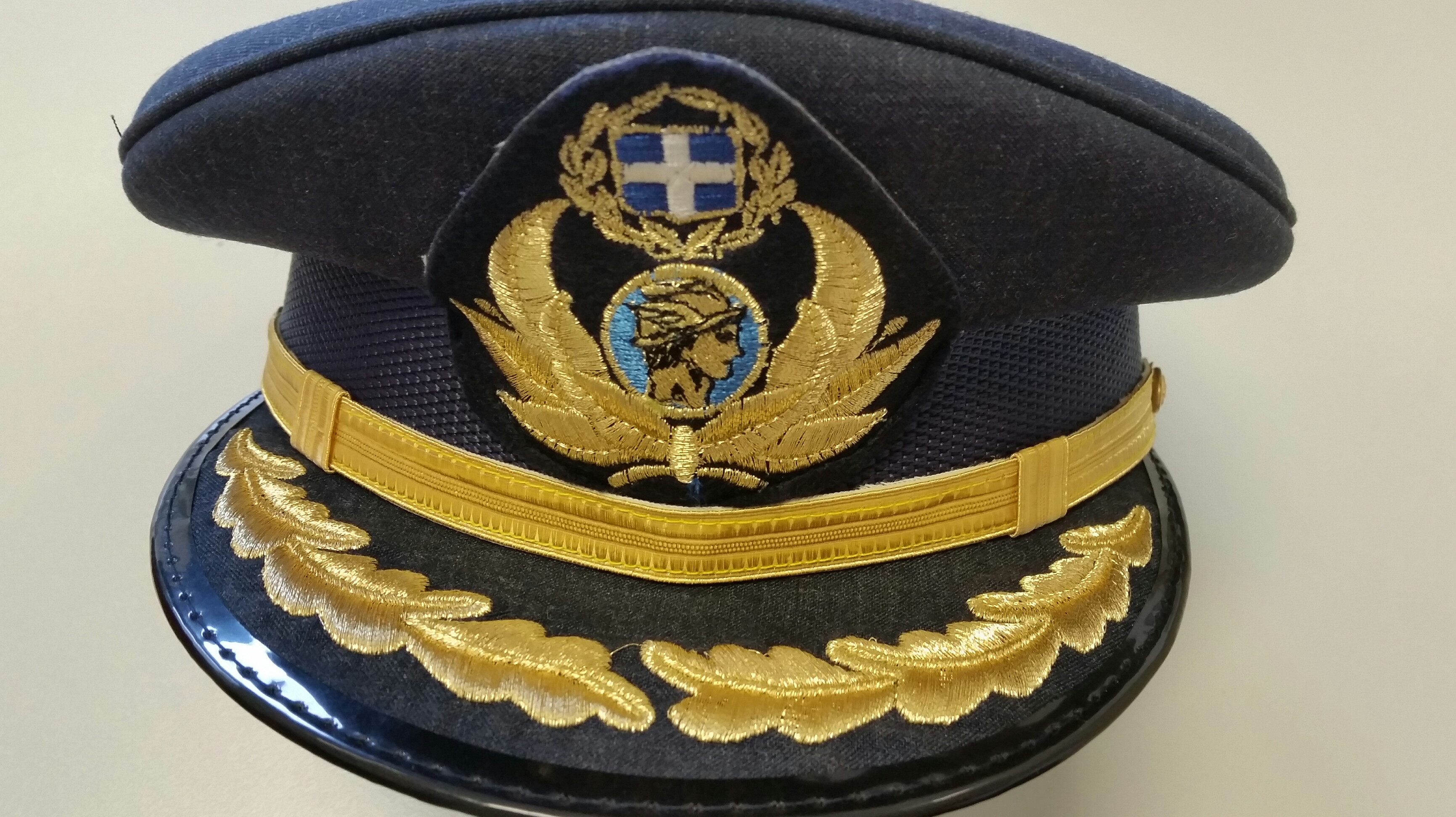 ΠΗΛΙΚΙΟ ΕΛΛΗΝΑ ΤΕΛΩΝΕΙΑΚΟΥ ΥΠΑΛΛΗΛΟΥ Α' ΒΑΘΜΟΥ